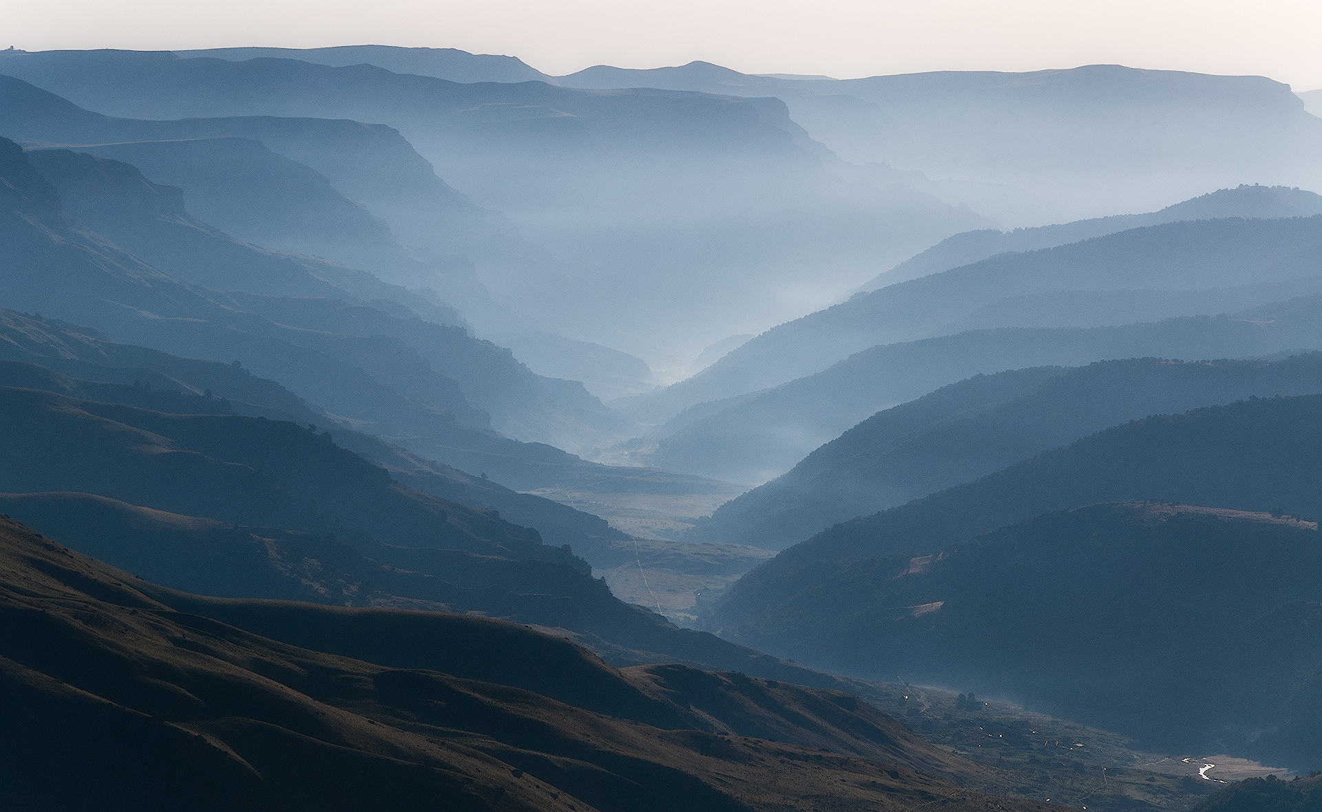 Фотография была сделана с плато Бермамыт. Справа на переднем плане Хасаутское ущелье, аул Хасаут. Хасаутский заказник: На территории Малокарачаевсого района. Расстояние от границы заказника до районного ценра с. Учкекен 20 км. С восточной стороны заказник граничит с Кабардино-Балкарской Республикой, а от южной границы до г. Эльбрус 14 км. Верховья рек Эшкакон и Подкумок, Черкесск, Малокарачаевский район, Карачаево-Черкесия This image is related to the protected area of Russia number 0910051